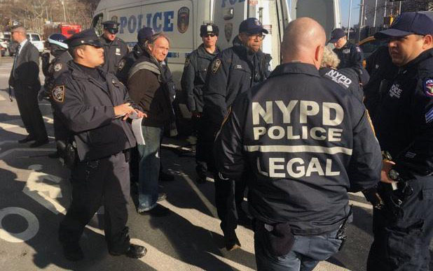 146 Arrests